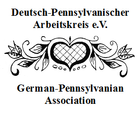 Deutsch-Pennsylvanischer Arbeitskreis (Logo)